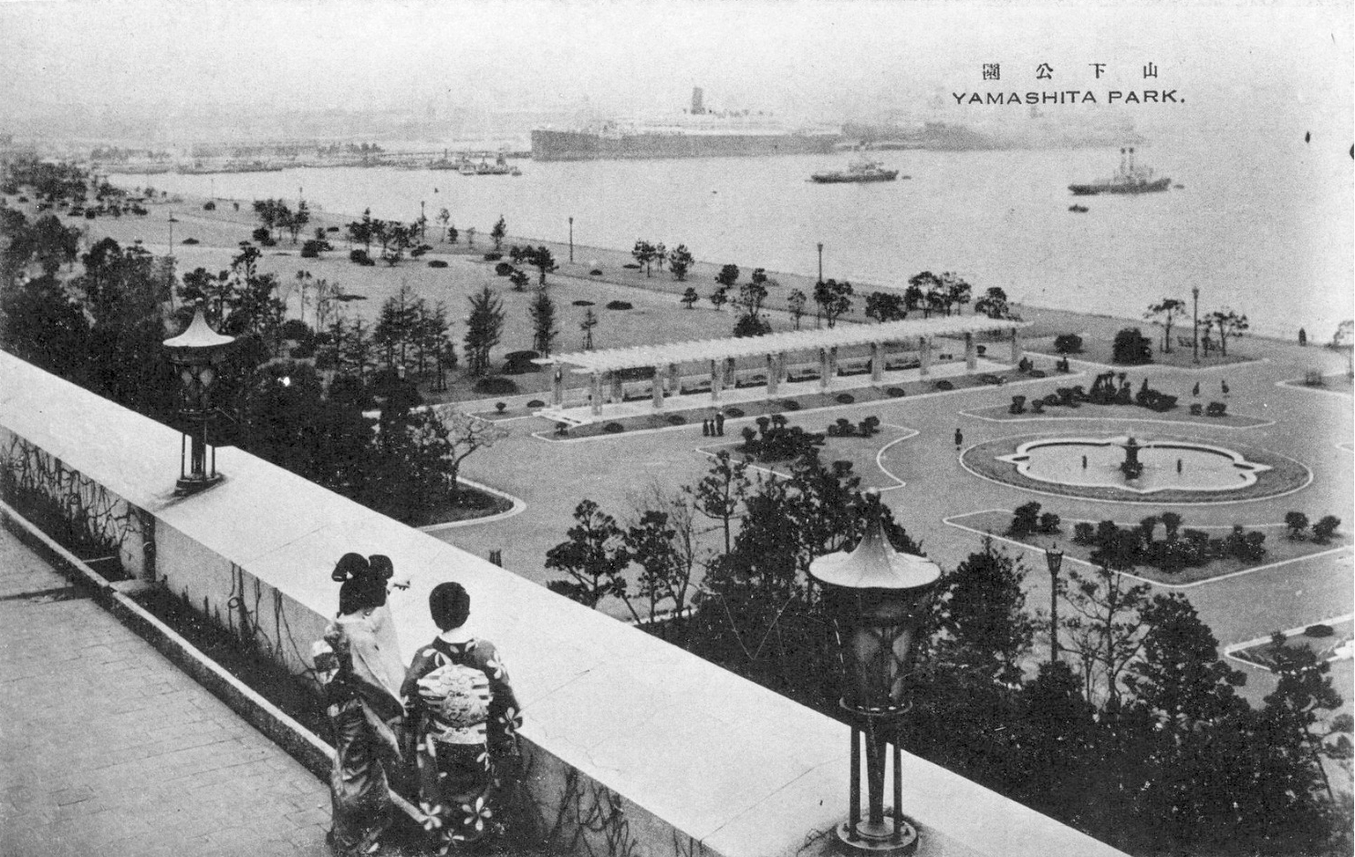 「復興の横浜 横浜市震災記念館 RECONSTRUCTED YOKOHAMA EARTHQUAKE MEMORIAL MUSEUM」10枚入のうちの1枚。1930年頃の撮影。